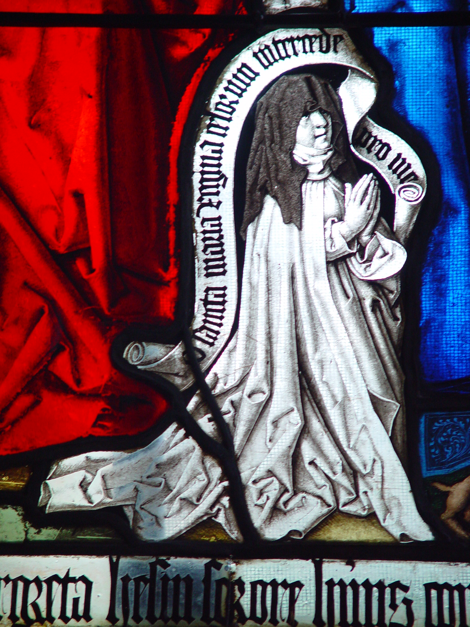 eigene Ausführung